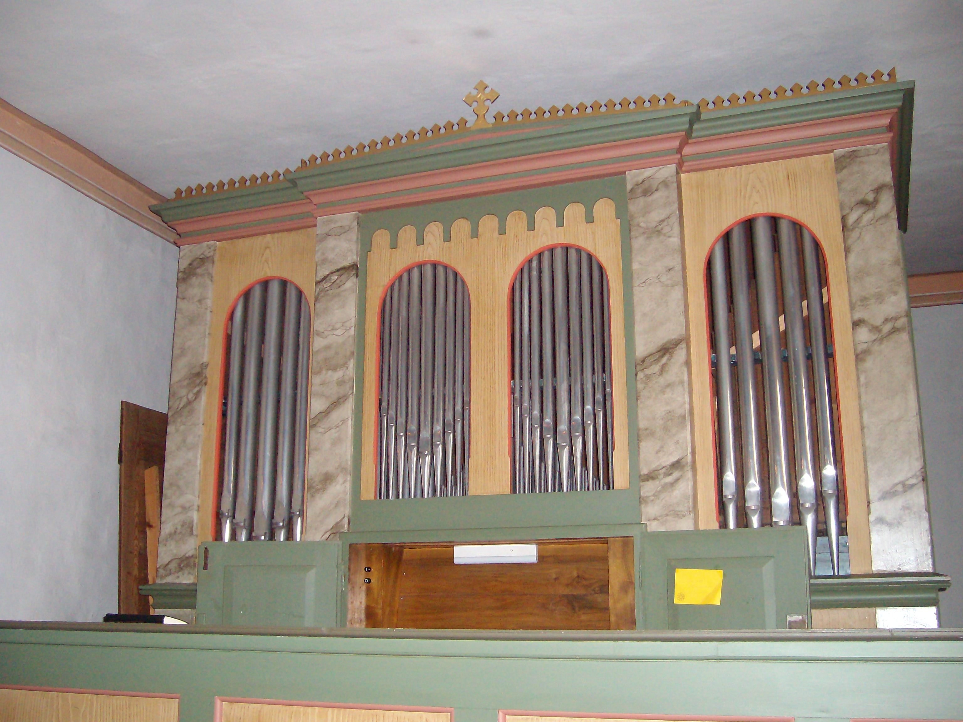 Evangelische Kirche Harbach, Grünberg, Landkreis Gießen, Hessen, Deutschland